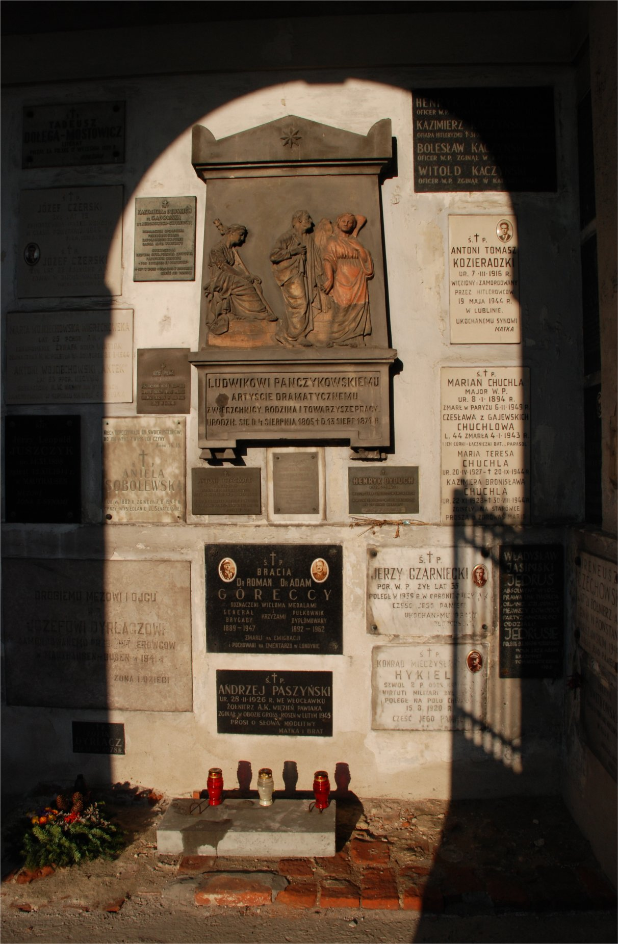 Epitafia we wnętrzu krużganków kościoła św. Antoniego z Padwy przy ul. Senatorskiej w Warszawie (fot Zu)